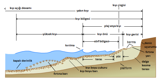 diğer_sürümler=